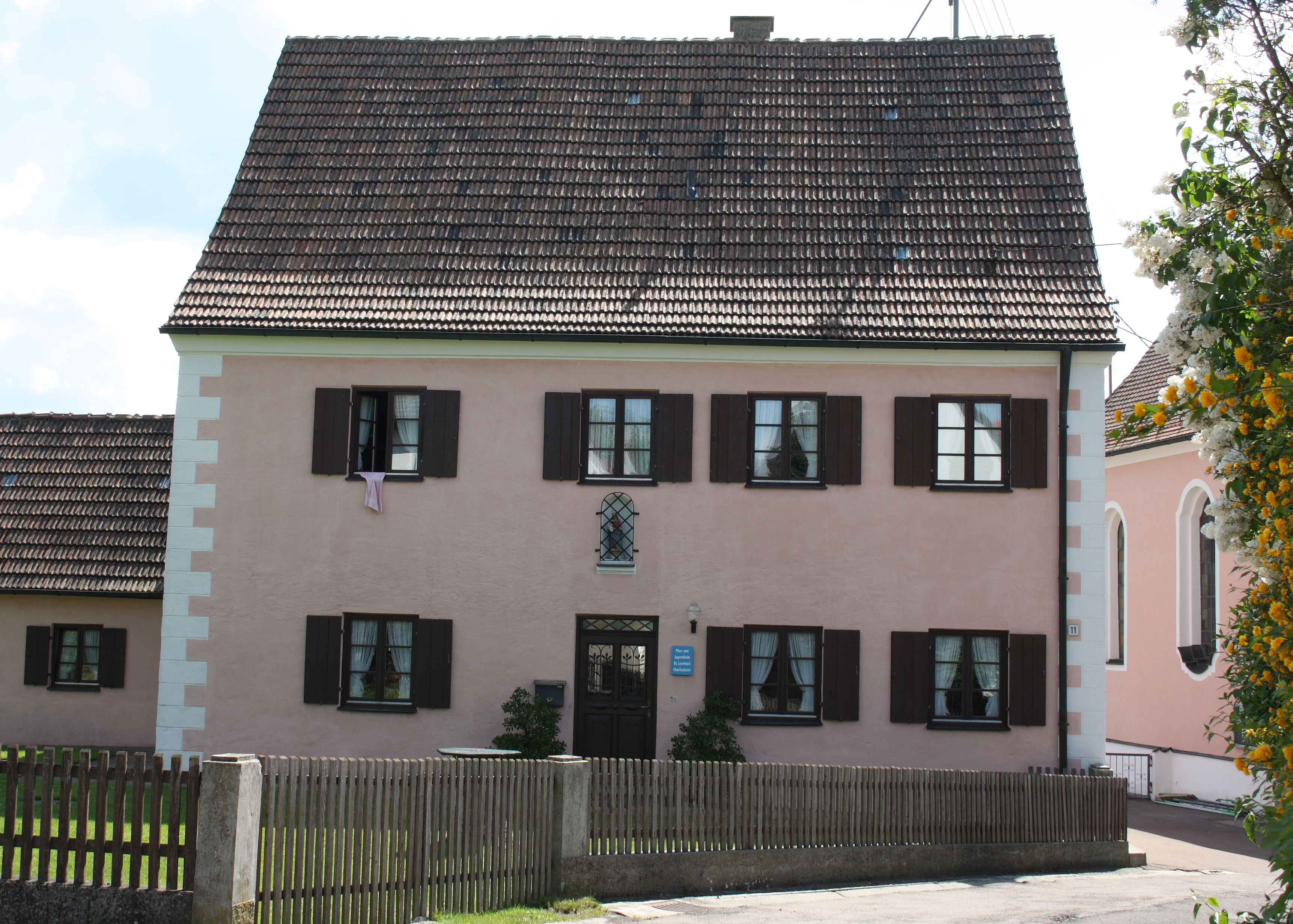 ehemaliges katholisches Pfarrhaus in Oberliezheim, 18. Jahrhundert